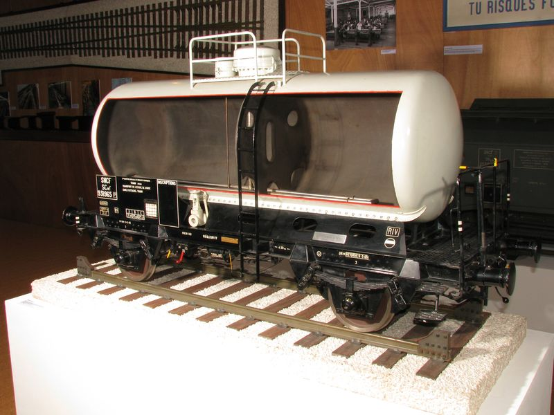 Maquette de wagon citerne, utilisé pour le transport de la lessive de soude par la Société Anonyme de Potasse et Produits Chimique de Thann (Haut-Rhin). Maquette réalisée par les élèves du Lycée professionnel De Dietrich et exposée au Musée Historique et Industriel - Musée du Fer de Reichshoffen.